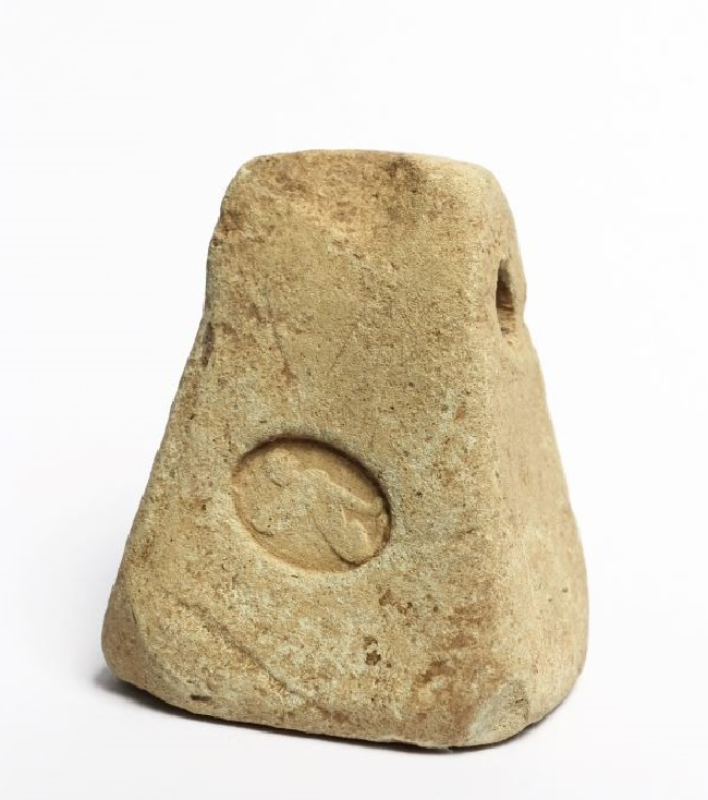 Peso con impresso grande albero.